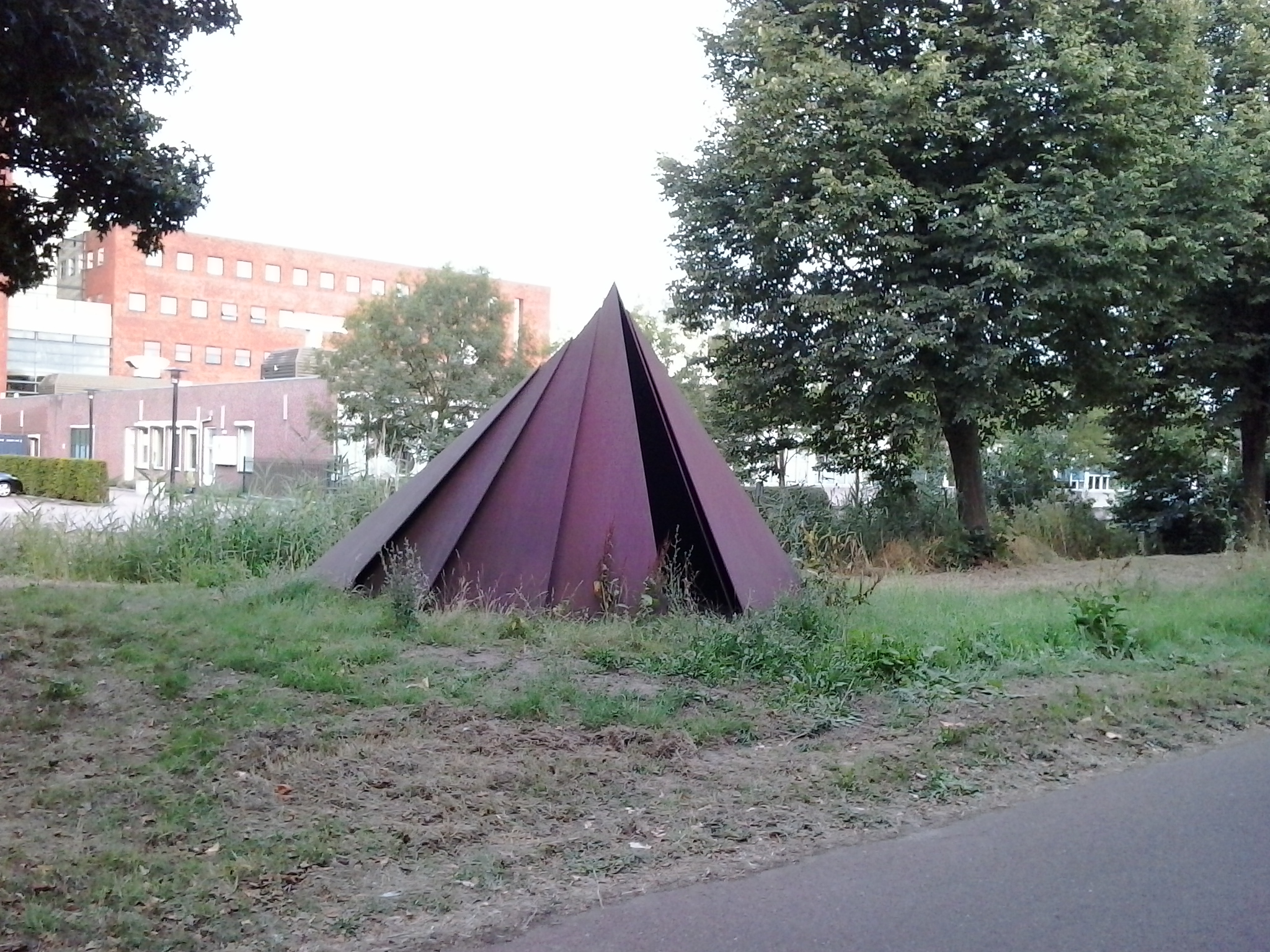 Shelter, Tony Andreas